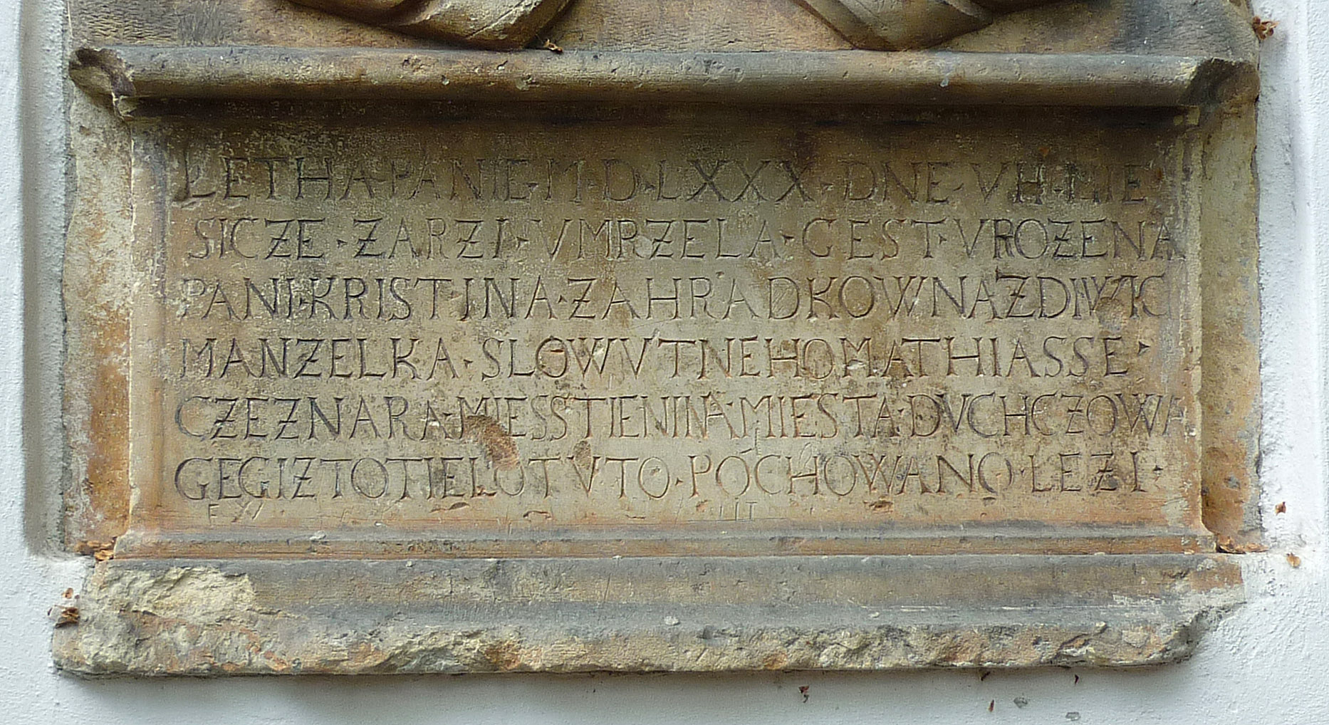 Spruch am Epitaph an der Kirche der Hl. Peter und Paul in Bilin (Bílina) in Nordböhmen mit folgendem Text: LETHA PANIE MDLXXX DNE VII MIE SICZE ZARI VMRZELA GEST VROZENA PANI KRISTINA ZAHRADKOWNA ZDIWIC MANZELKA SLOWUTNEHO MATHIASSE CZEZNARA MIESSTIENINA MIESTA DUCHCZOWA GEGIZTOTIELO TUTO POCHOWANO LEZI „Anno Domini 1580, am 7. September, ist verstorben Frau Kristina Zahradkowna aus Zdiwic, Ehefrau des hochwohlgeborenen Mathias Czesnar, des Bürgers der Stadt Dux, deren Körper hier begraben liegt.“